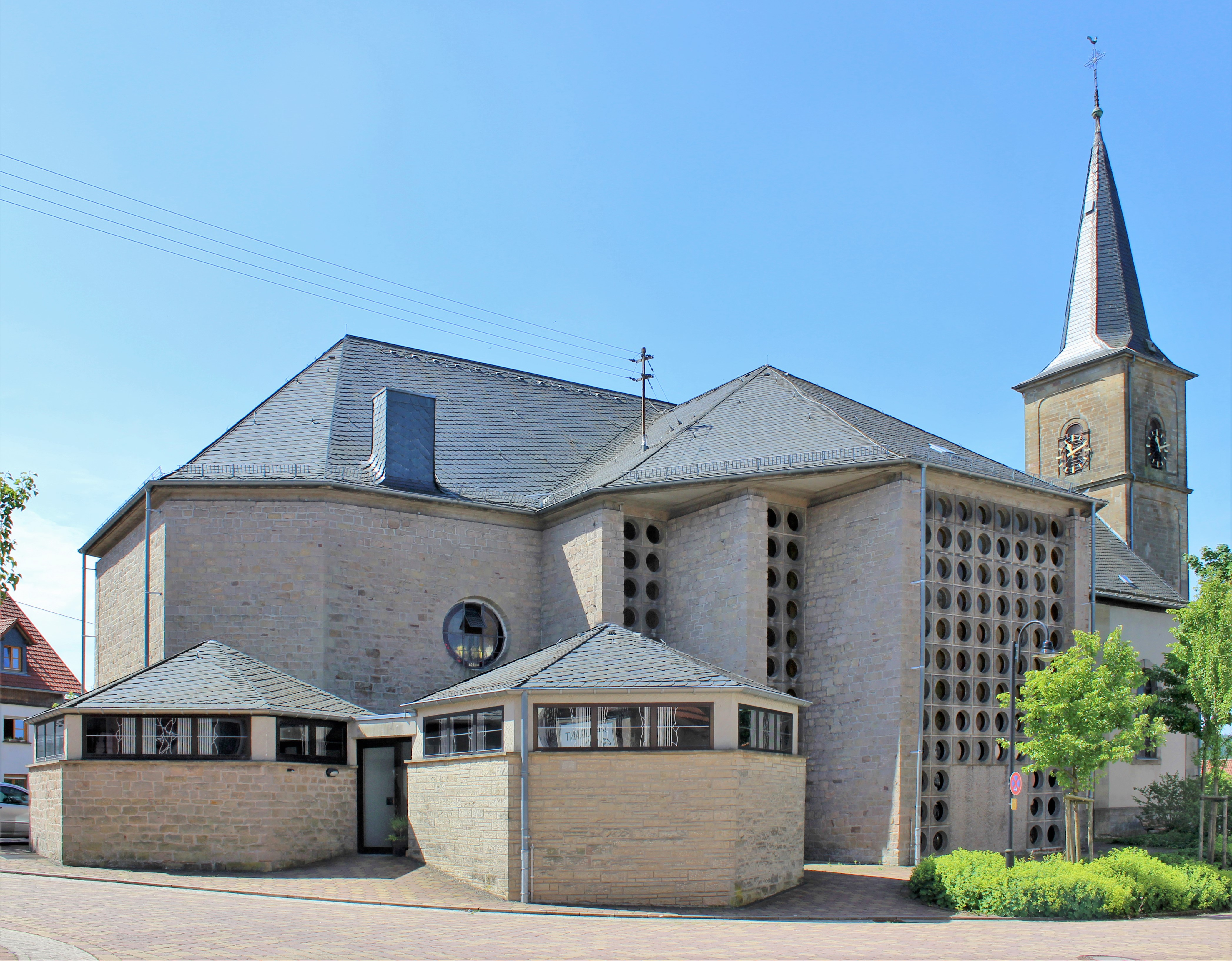 Katholische Pfarrkirche St. Remigius, Freisen, Landkreis St. Wendel, Saarland